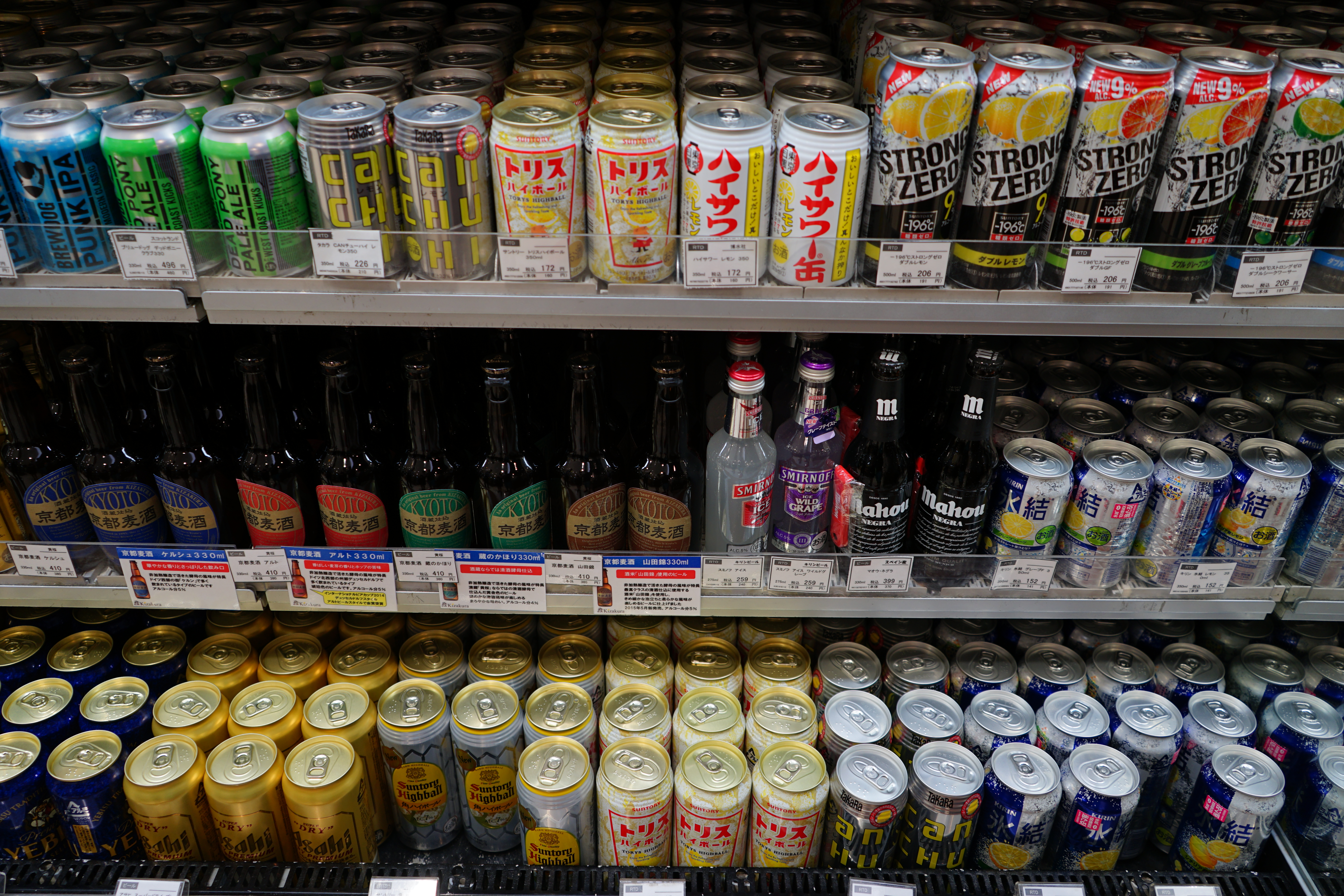 Mahou negra